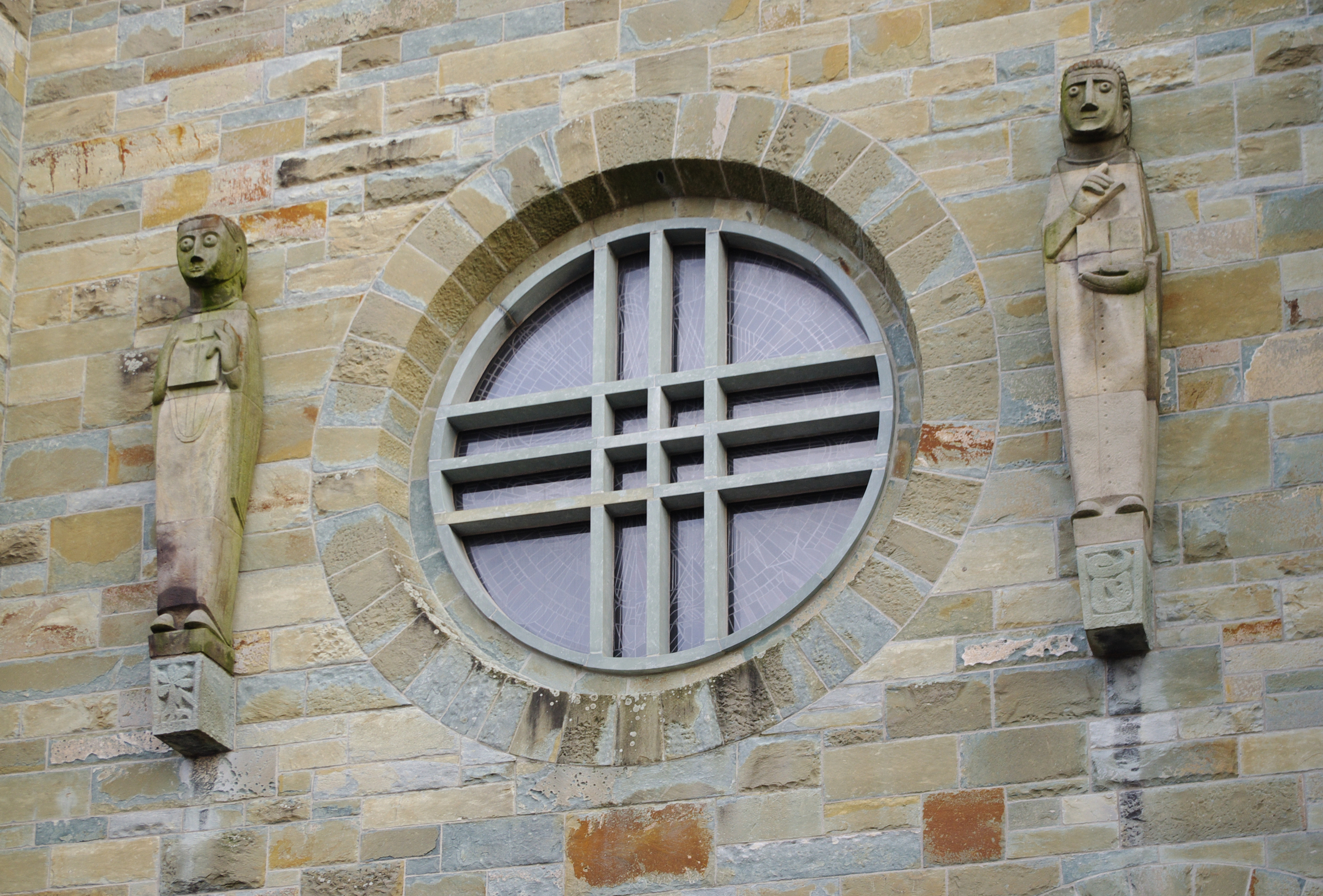 Katharinenkirche Unna, Skulpturen über dem Portal von Josef Baron, Unna